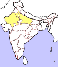 Kartan bygger på resultatet från valet till Lok Sabha april/maj 2004. Gult betyder att partiet lanserat en eller flera kandidater i delstaten, dock utan att vinna mandat. Orange betyder att partiet vunnit mandat från delstaten. Rött betyder att partiet vunnit minst 25% av mandaten från den delstaten och mörkrött 50% eller mer. Kartan tar inte hänsyn till avhopp, partifusioner och fyllnadsval under den ordinarie mandatperiodens gång. Gjord av Soman.